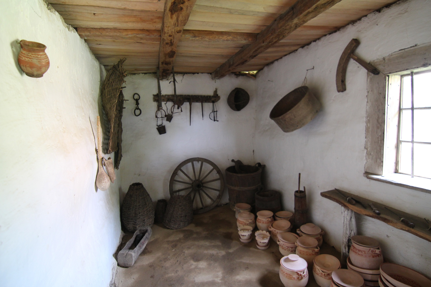 Casa - Muzeu "Constantin Brâncuși"